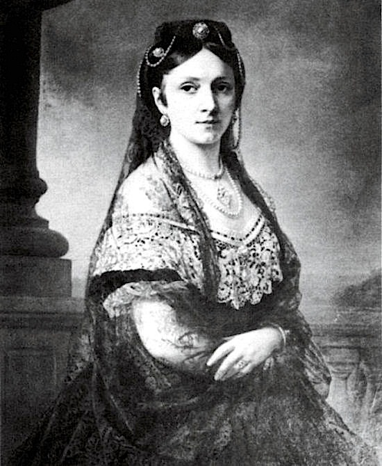 Portrait von Julia Gräfin Hauke, Prinzessin von Battenberg